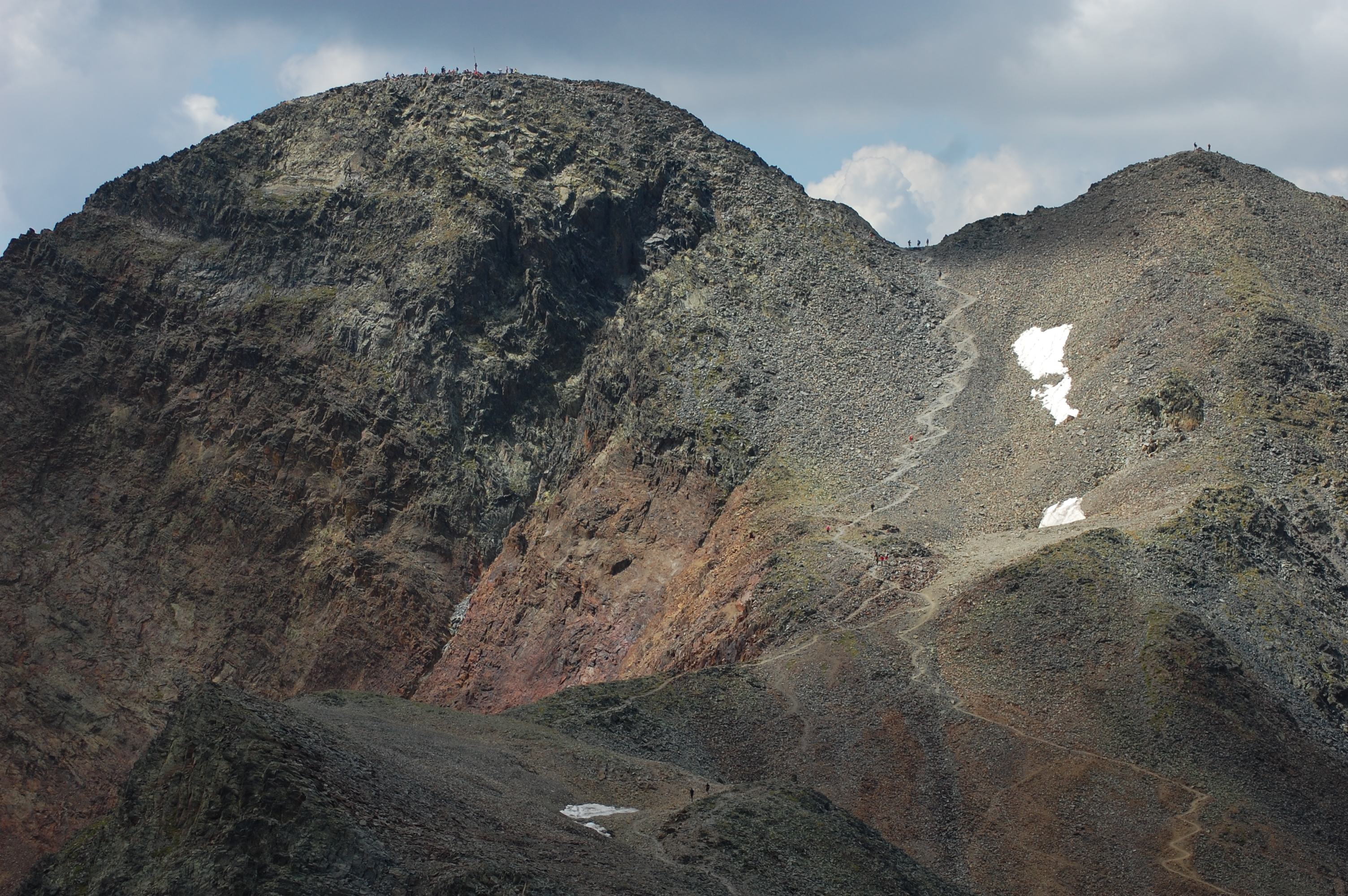 Pica d'Estats (3143m)